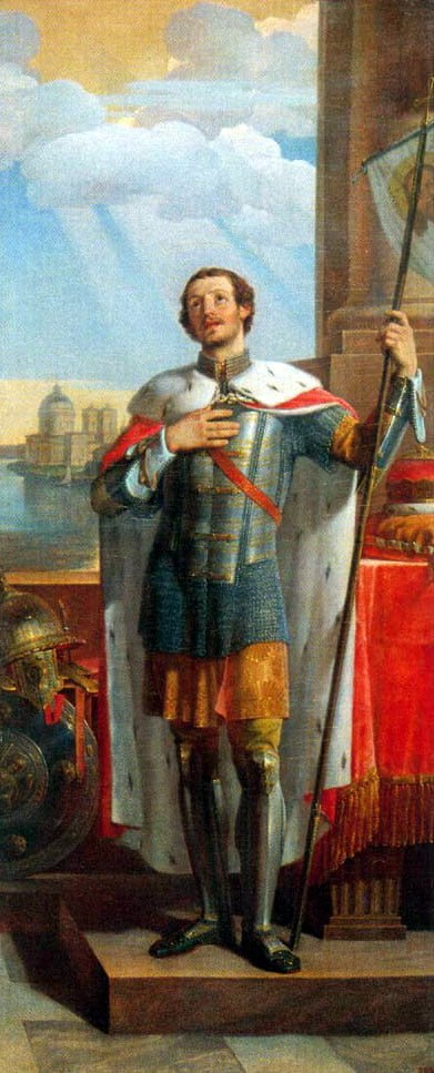 Шебуев Василий Козьмич. Александр Невский. 1836